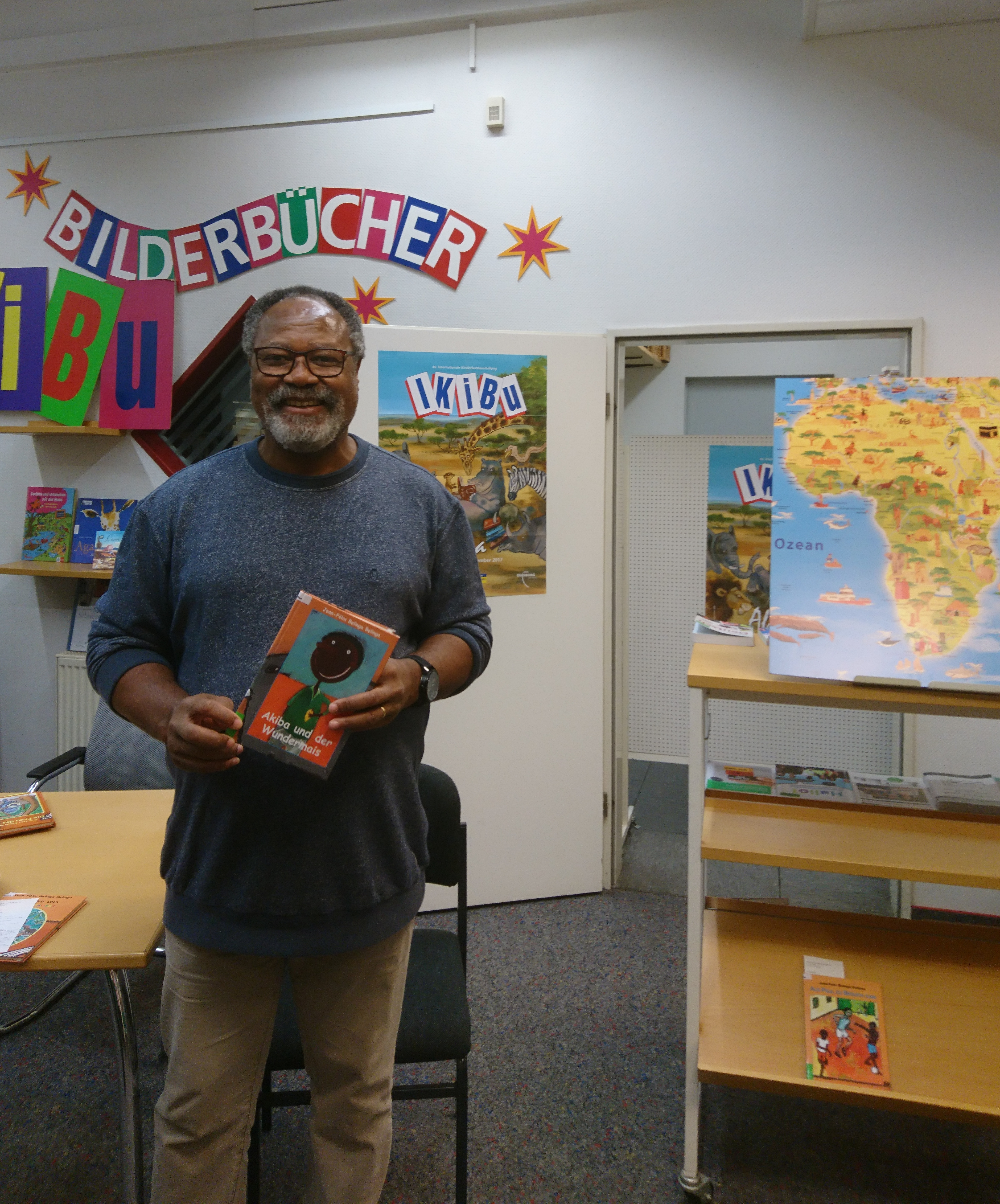 Jean-Félix Belinga-Belinga (*1956), Autor, Journalist und Pfarrer auf der Internationale Kinder- und Jugendbuchausstellung (IKiBu) in der Stadtbibliothek Duisburg